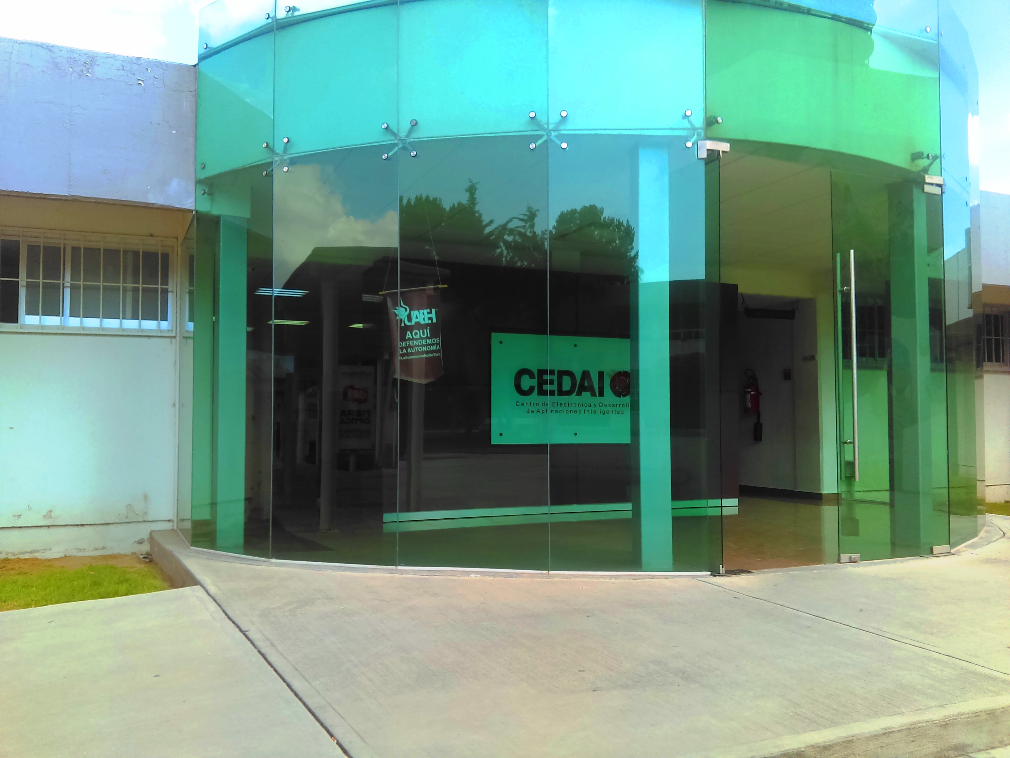 Ciudad del Conocimiento de la UAEH.